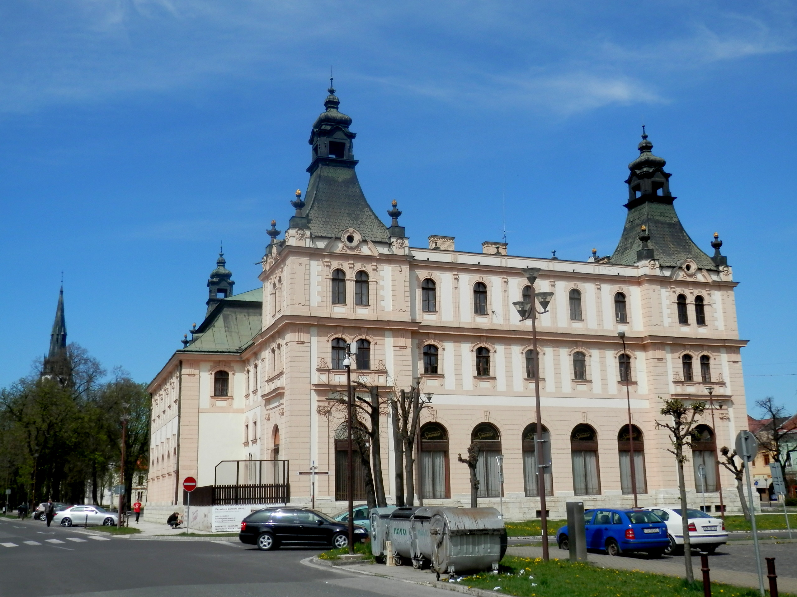 Budova Reduty je vedená v zozname národných kultúrnych pamiatok SR. Doba vzniku 1900-1905. Prevládajúci sloh secesia. Pre spoločnosť Imre Halmaiho Straussa ju postavil staviteľ Kálman Gezster. Okrem divadelnej sály boli v pôvodnej budove aj hotel, koncertná sála a kaviareň. Od roku 1992 v nej má sídlo Spišské divadlo. Radničné námestie. Mesto Spišská Nová Ves.